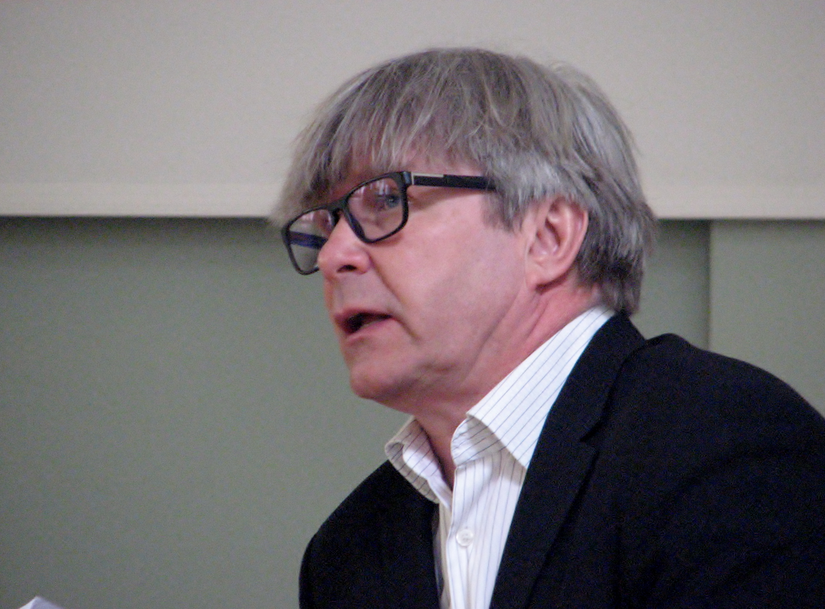 Mart Kalm Tallinna Raamatumessil vestlemas Krista Kodresega